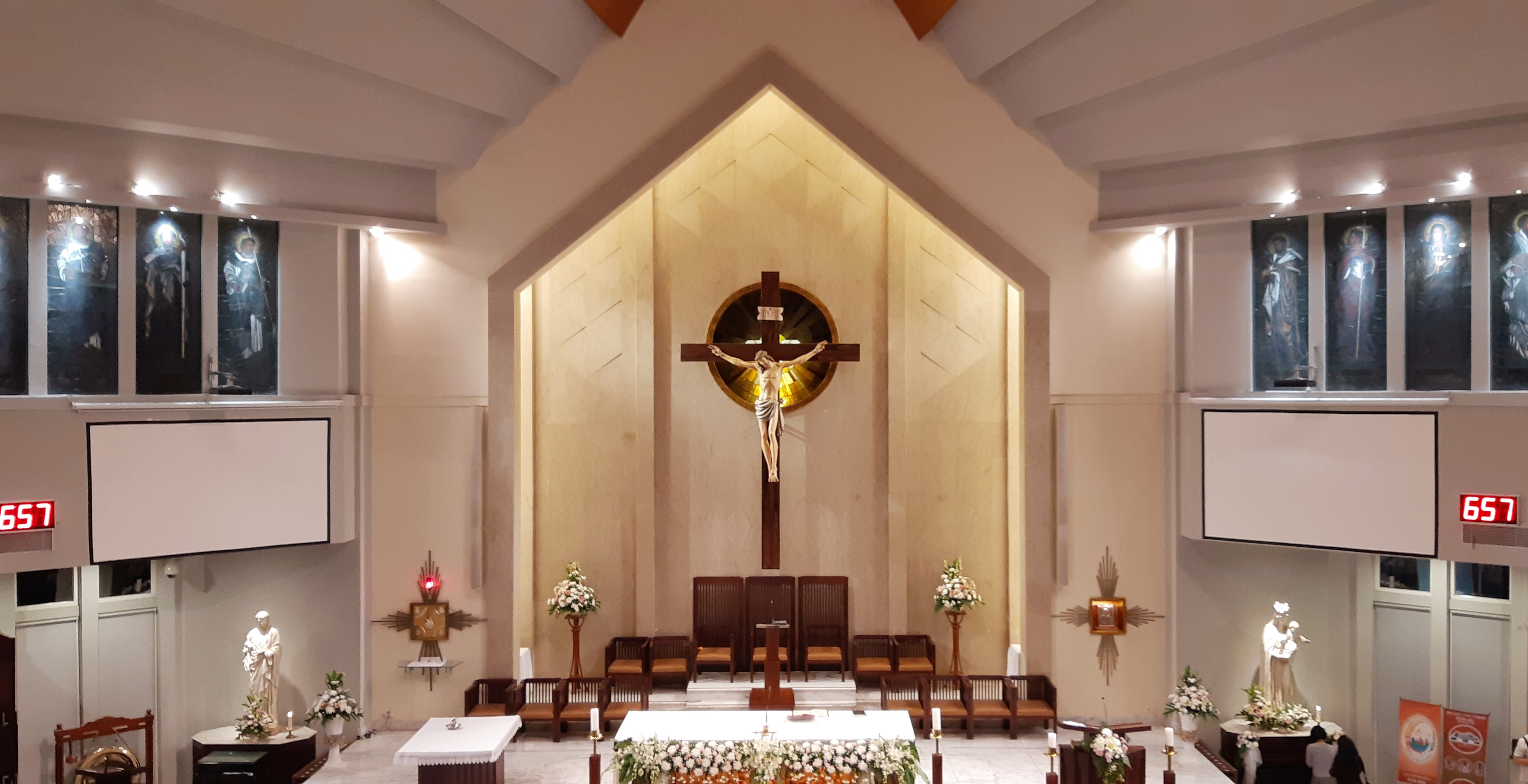 Gereja Santo Yakobus Februari 2020